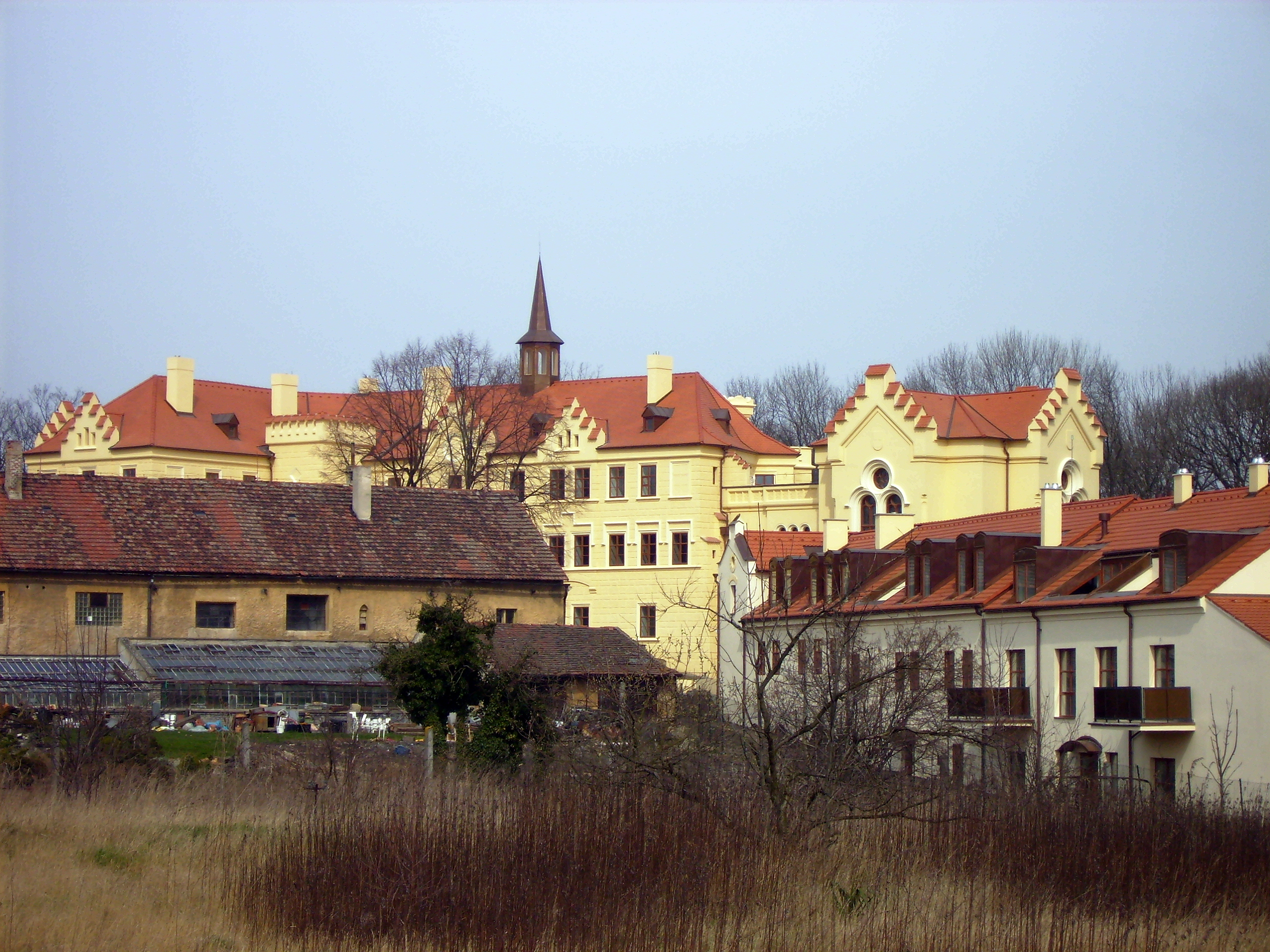 Zámek v Jirnech, stav z jara 2007.